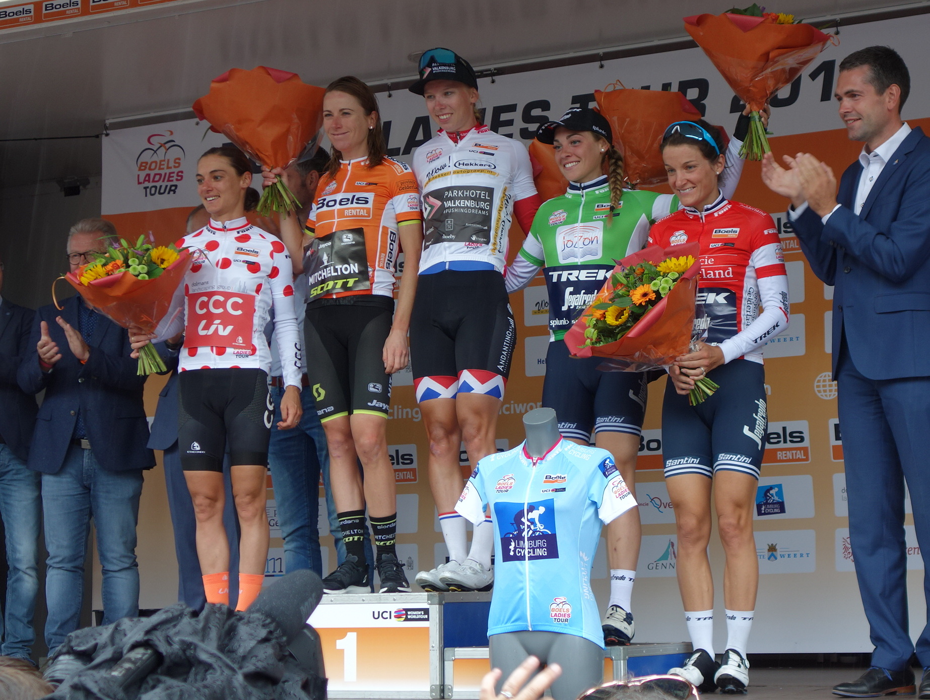 Alle dragers van de truien na de eerste etappe in Weert in de Boels Ladies Tour 2019 (Moolman bolletjes, v.Vleuten leidster, Wiebes jongere, Paternoster punten, Deignan strijdlust)